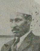 山岡光太郎 コンスタンティノープルで